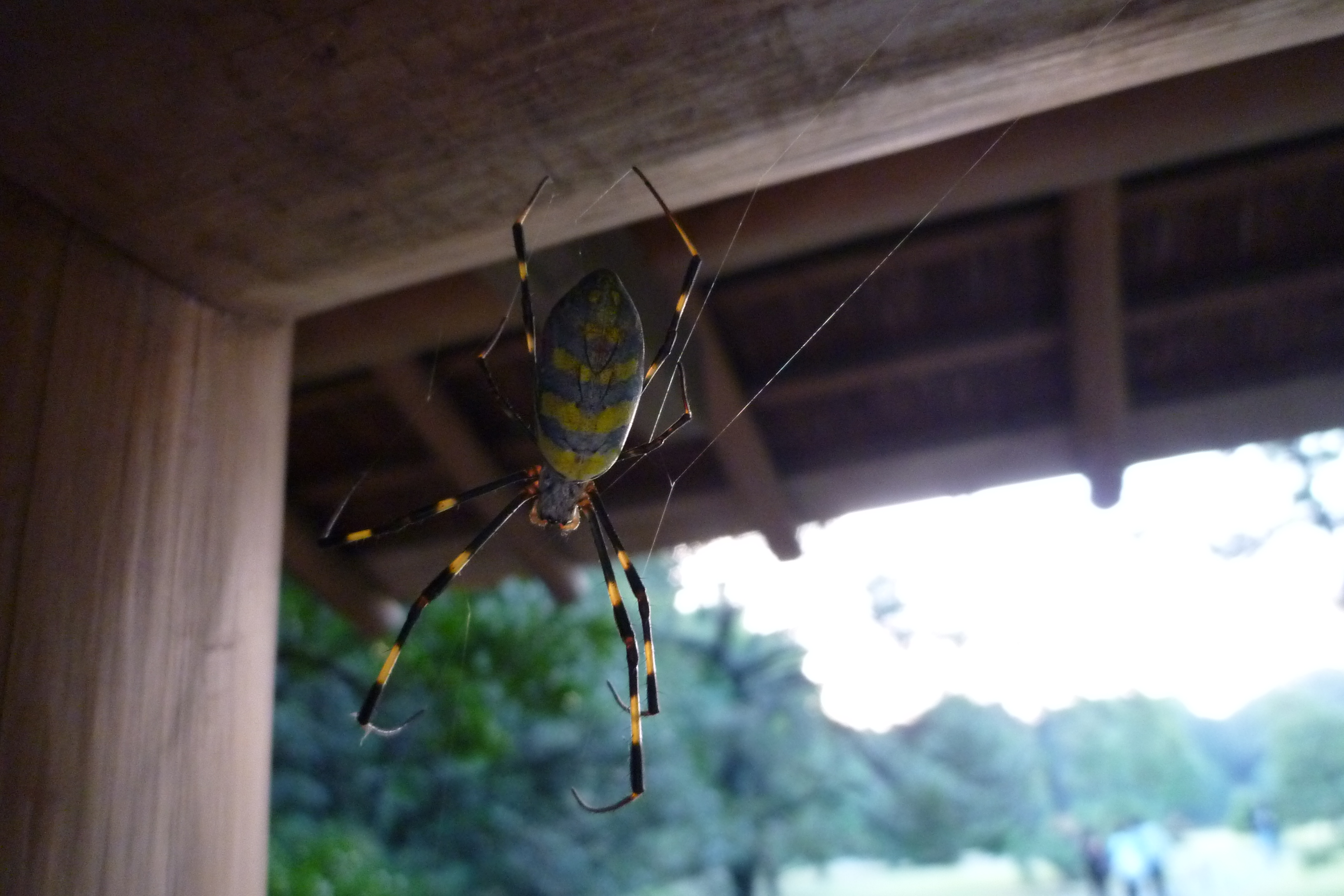 ジョロウグモ（女郎蜘蛛、 上臈蜘蛛、学名 Nephila clavata)